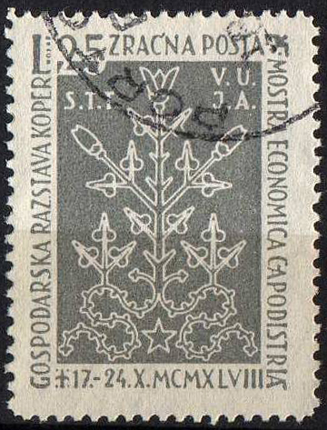 Первая авиапочтовая марка Свободной территории Триест (Зона "Б") Free Territory of Trieste, Zone B